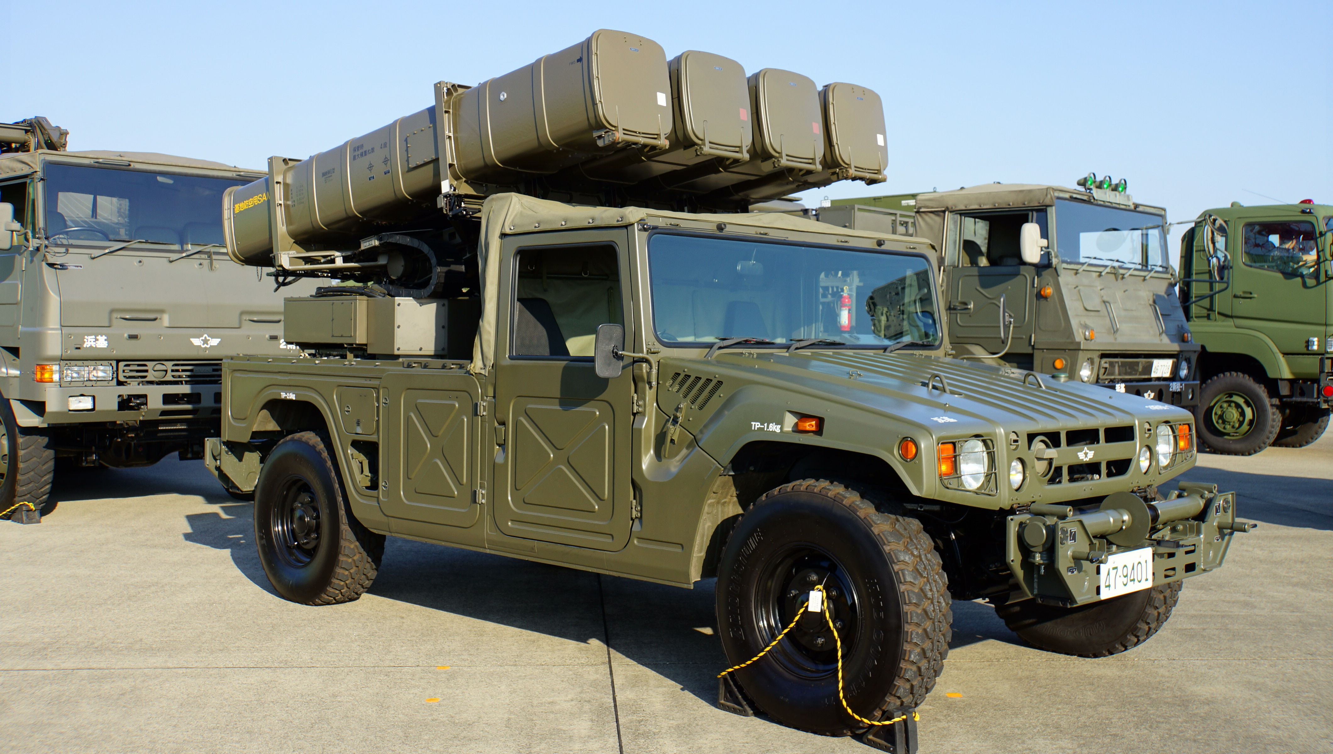 航空自衛隊 基地防空用地対空誘導弾（11式短距離地対空誘導弾） 発射装置（LCH）。 14年9月28日 浜松基地にて。